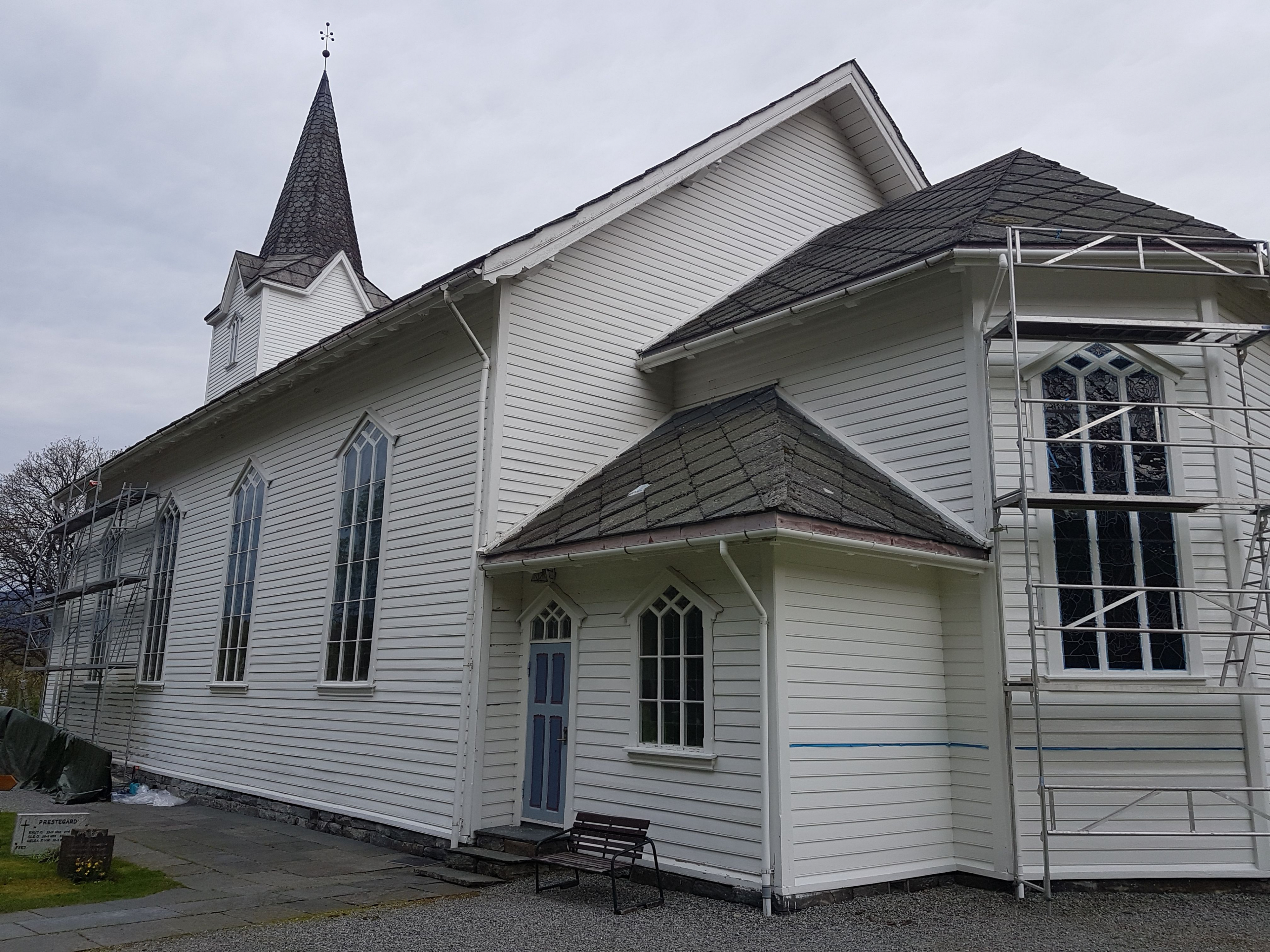 Jondal kirke. Foto: Roger Grimelid. Fra Riksantikvarens Kulturminnesøk.